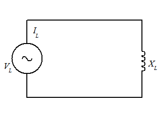 Circuito eletrônico formado por fonte CA e indutor.